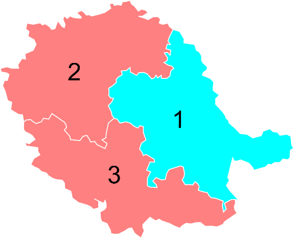 Résultats des élections législatives du Tarn en 2012